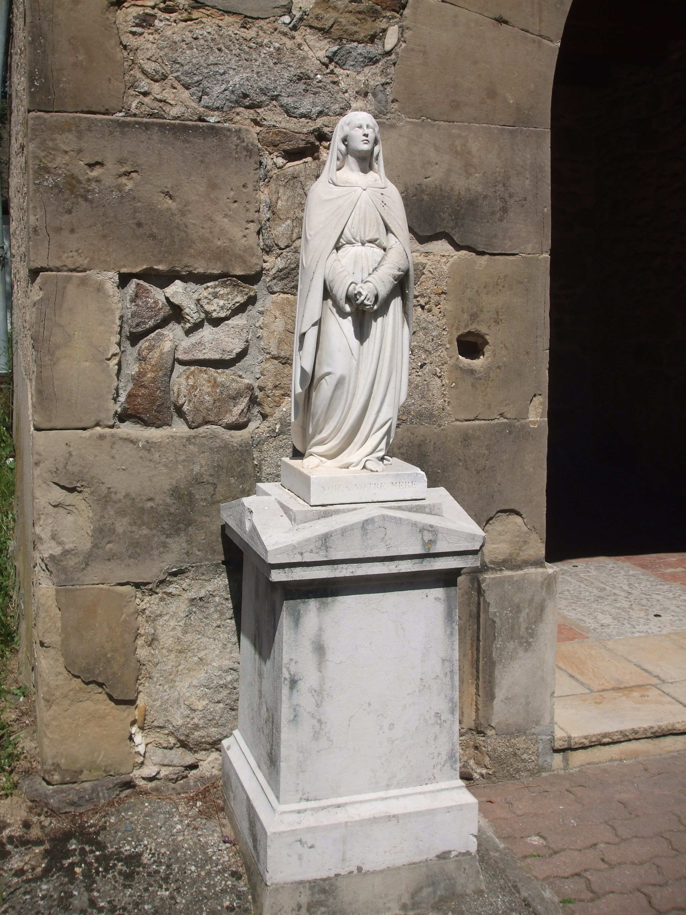 statue de la Vierge près de l'entrée de l'église